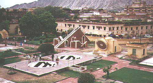 image observatoire de Jaipur